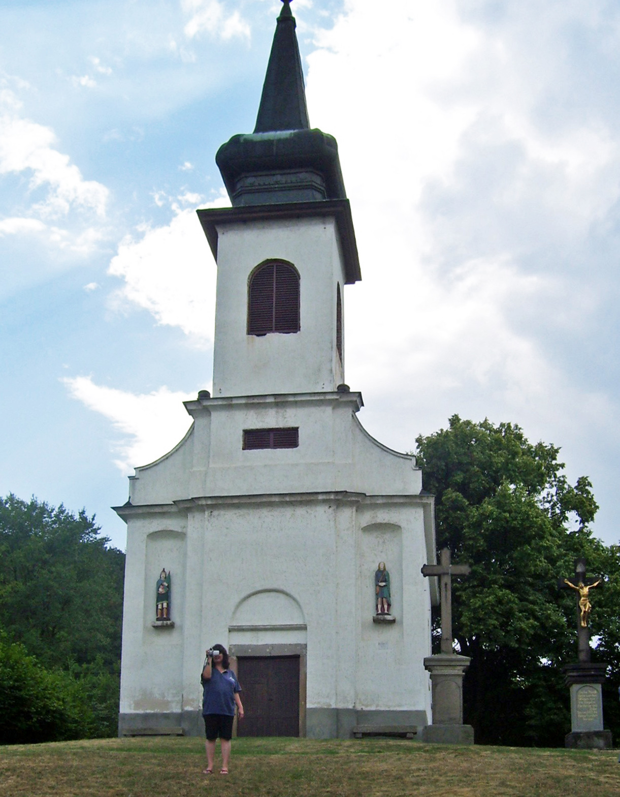 Szent Donát kápolna.Késő barokk, 19 sz. eleje..